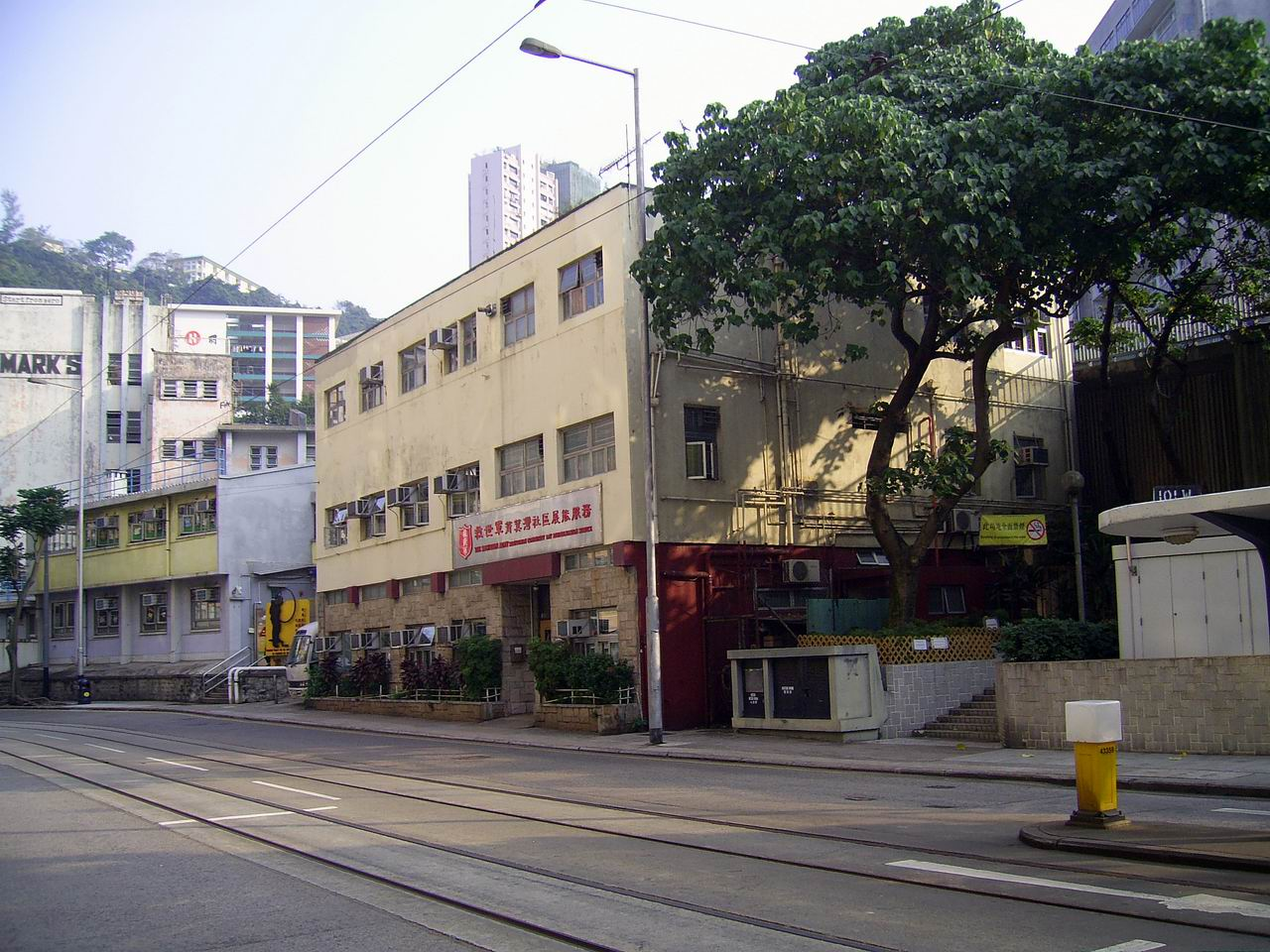 中文（香港）: 香港救世軍筲箕灣社區展能服務